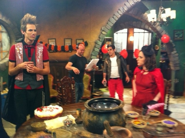 על סט בית ספר למכשפים - ליאת הר לב, עידו מוסרי, אלון גור אריה, ליאור פאוקר